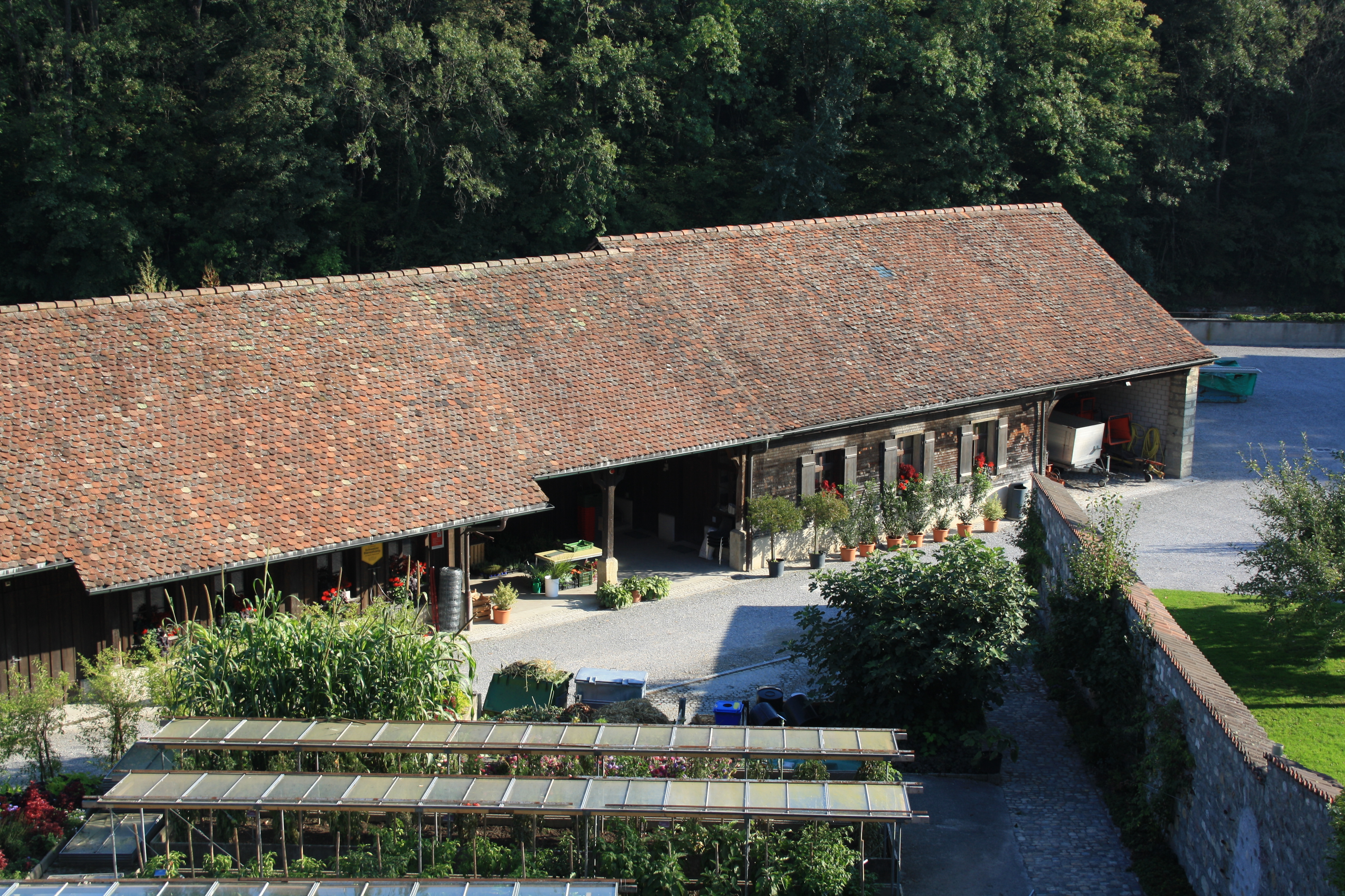 Kloster Wettingen